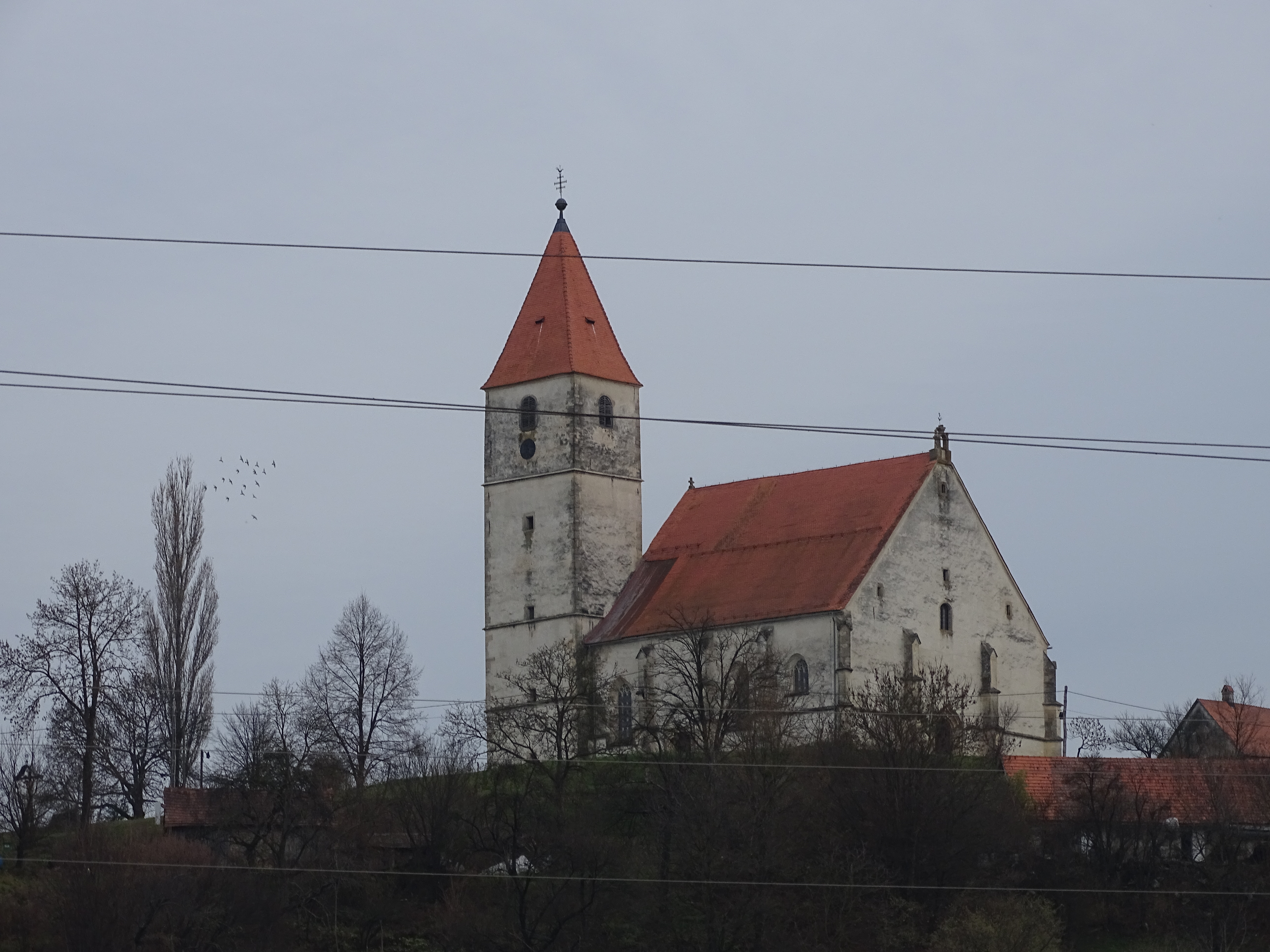 Cerkev Svetih Treh Kraljev v Slovenskih goricah.